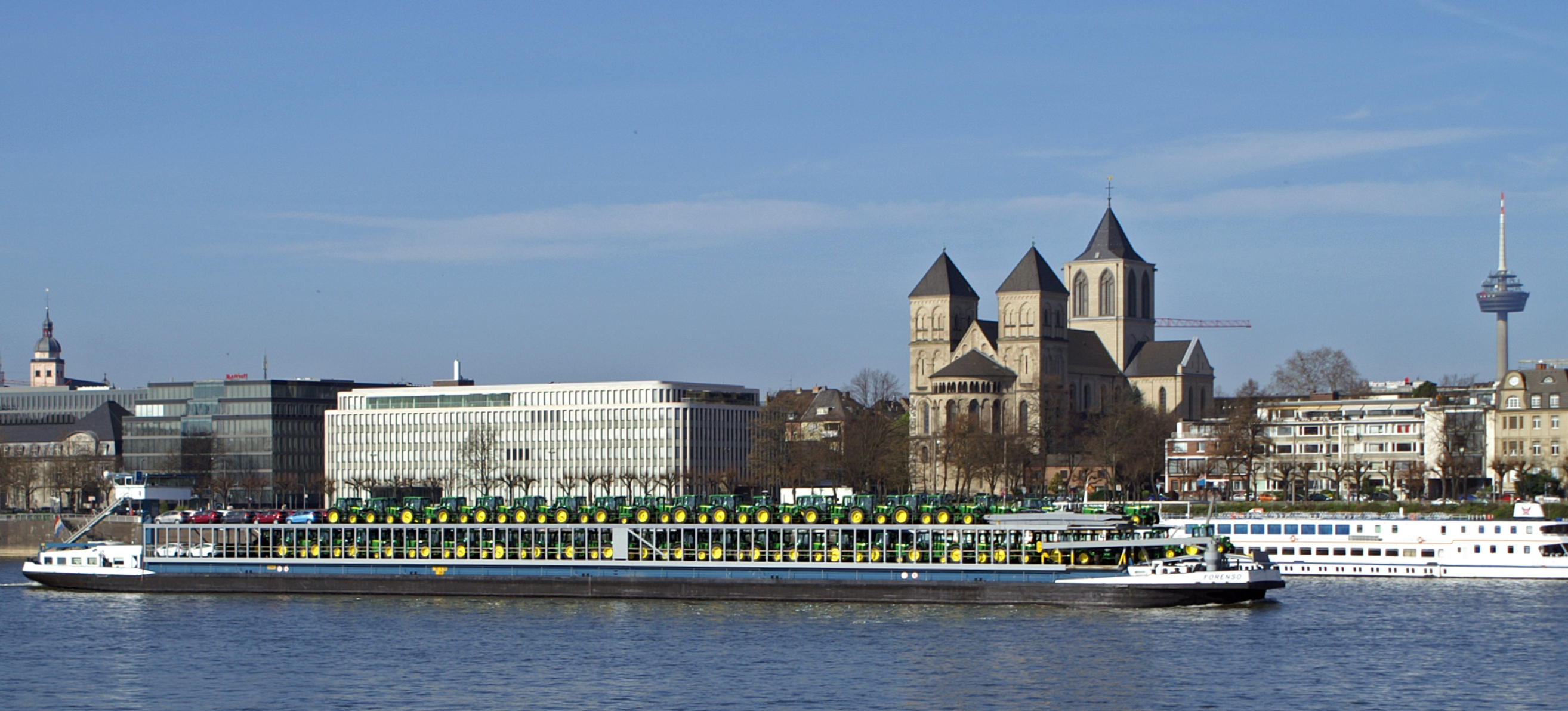 RoRo-Schiff „Forenso“ mit John-Deere-Schleppern und einigen Pkw auf Fahrt auf dem Rhein in Köln.